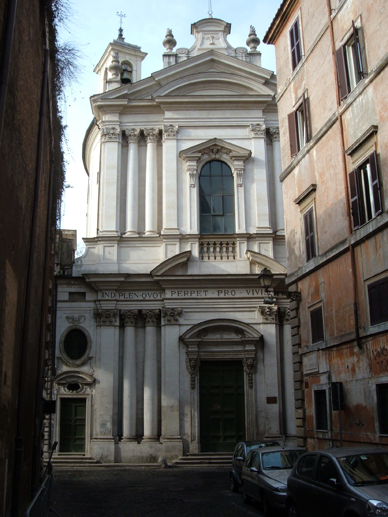 Chiesa di S. Maria dell'Orazione e Morte, in via Giulia a Roma, nel rione Regola.